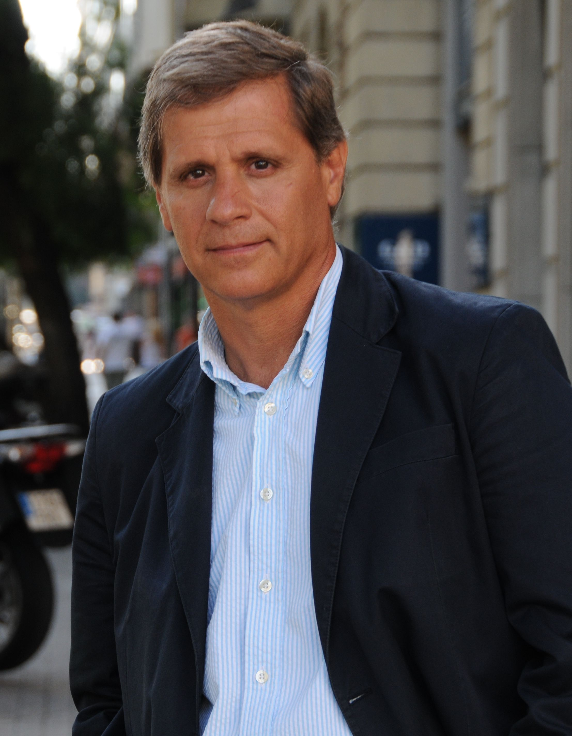 Foto oficial del candidato a la Alcaldía de Barcelona (España) Alberto Fernández Díaz del Partido Popular de Cataluña